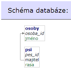 Cizí klíč - obrázek k příkladu